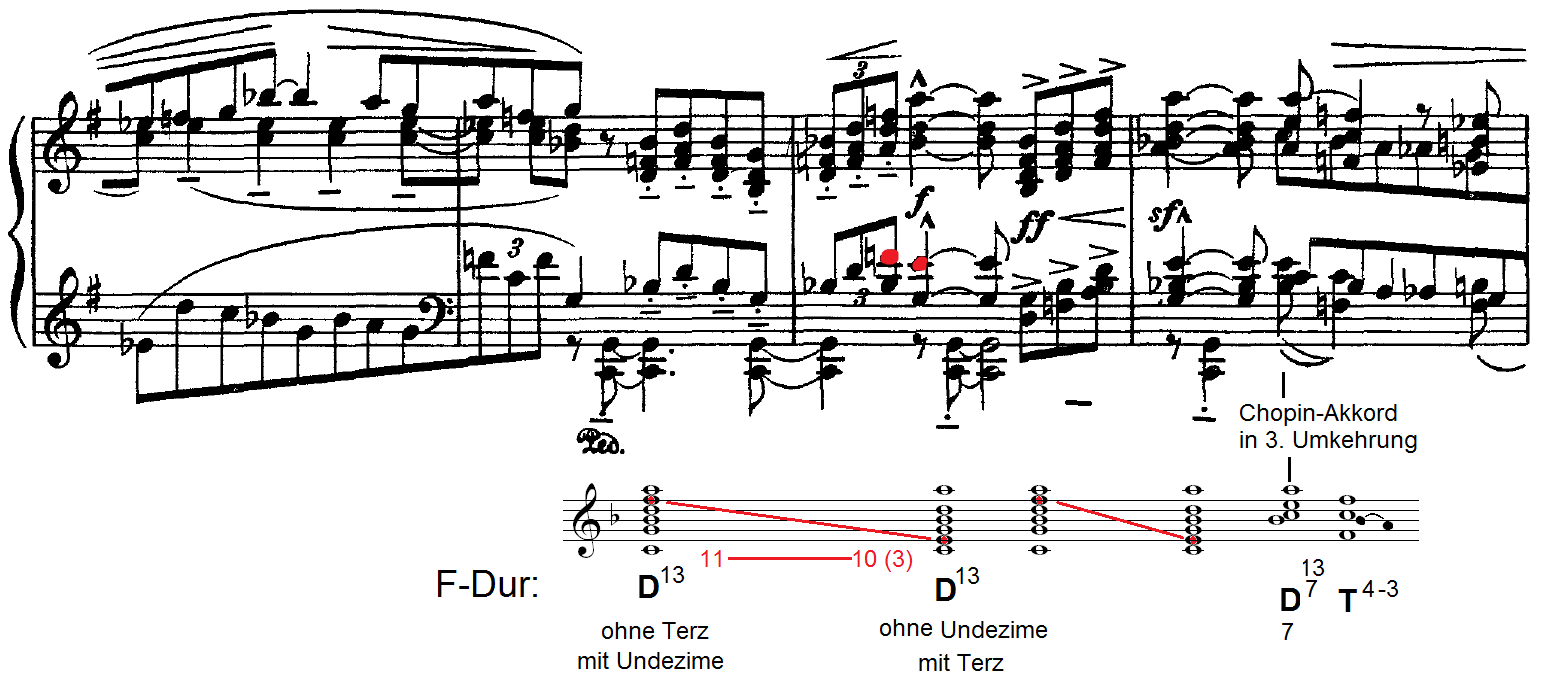 Tredezimenakkord in Ravels Pavane pour une enfante defunte